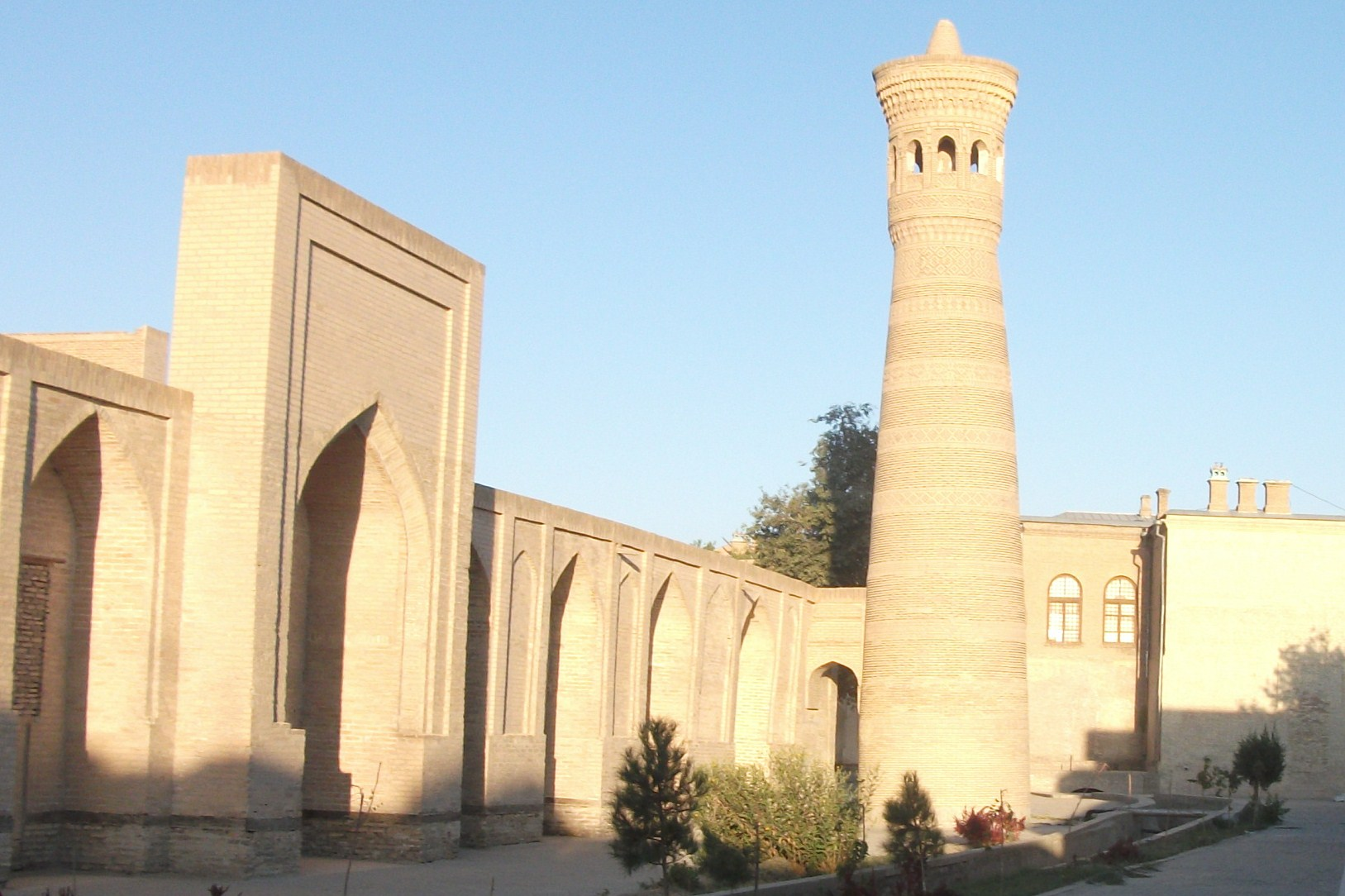 Минарет Ходжа Калон, Бухара